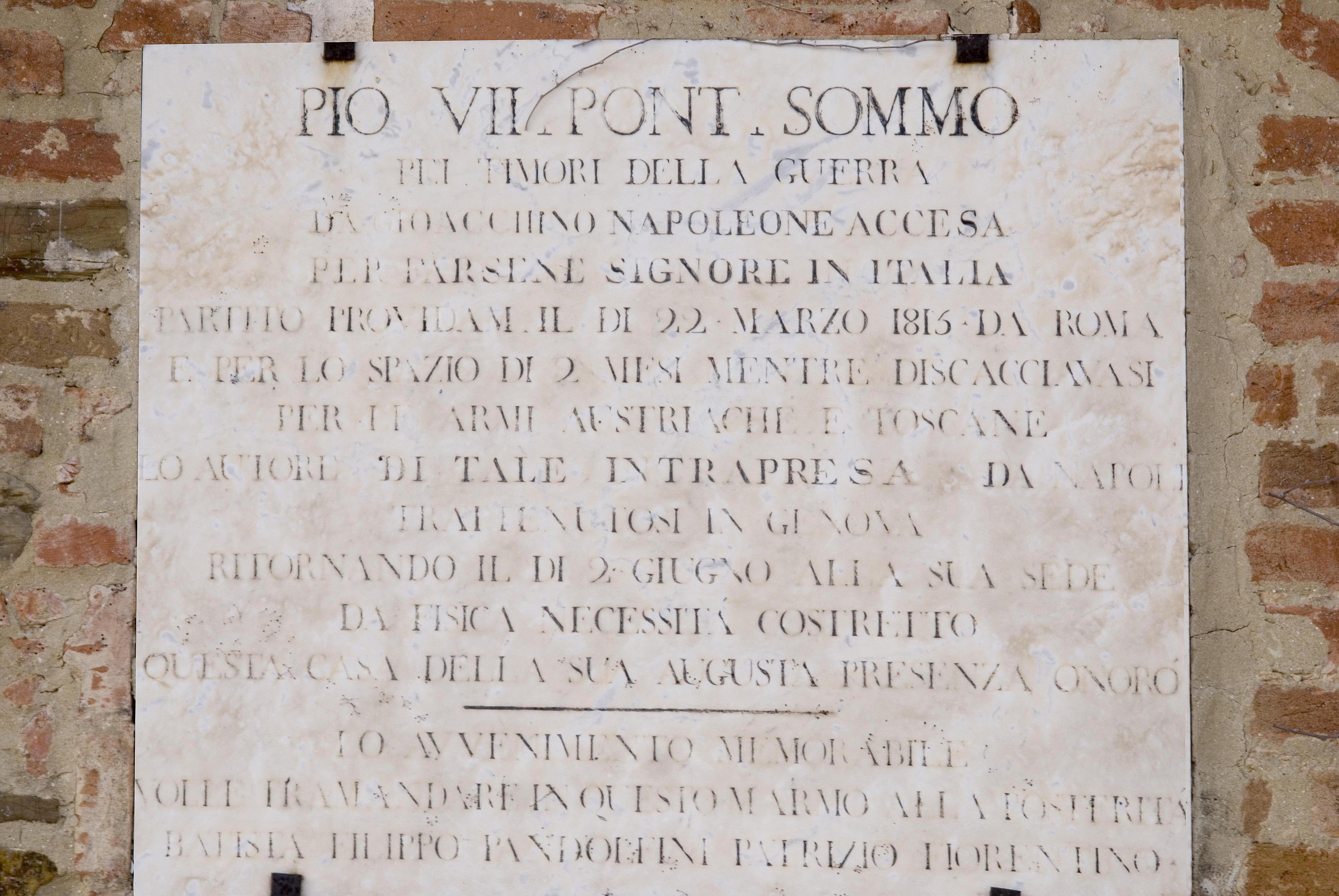 Lapide di Papa Pio VII (Barberino Val d'Elsa)